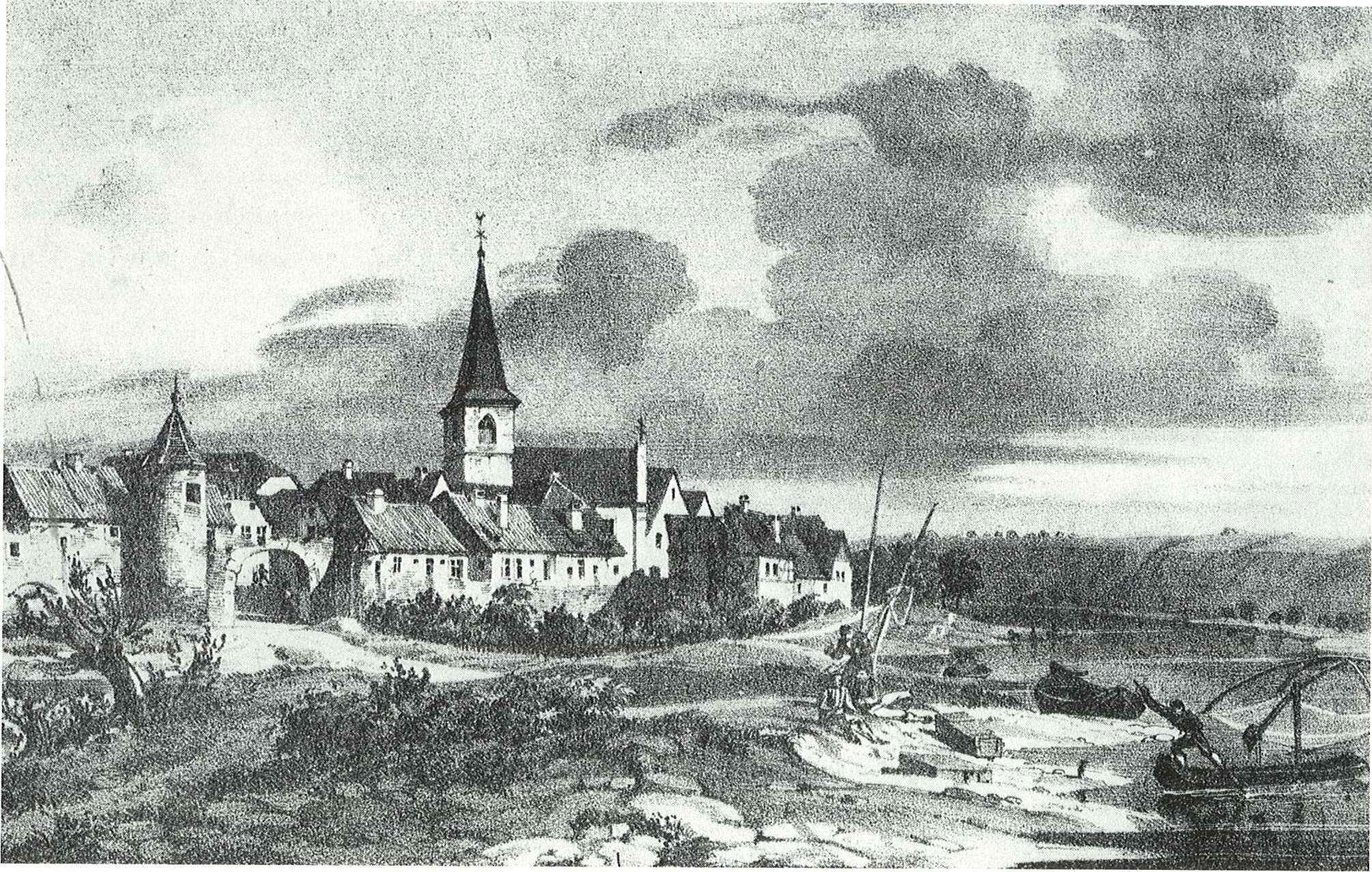 Litographie Fahr, Franz Leinecker um 1840, urspr. Beschreibung: "FL", "Fahr a/M", 17,9 x 11,4 cm, heute im Museum für Franken, Würzburg